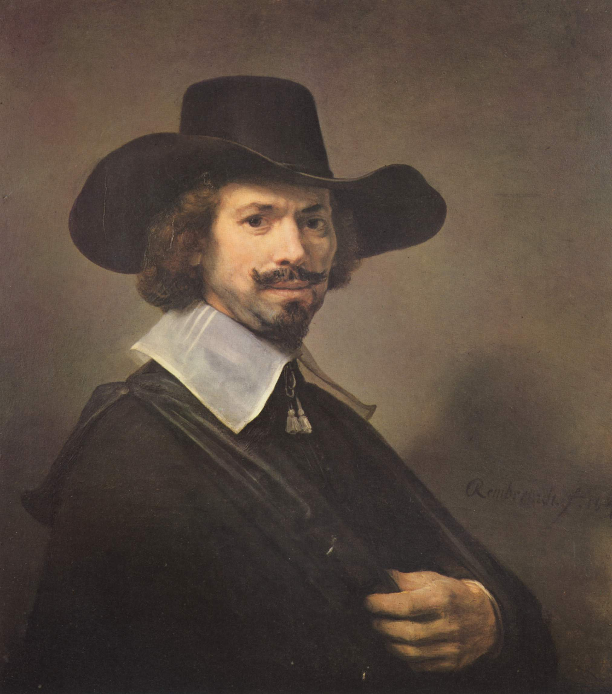 Pendant of File:Rembrandt 213.jpg